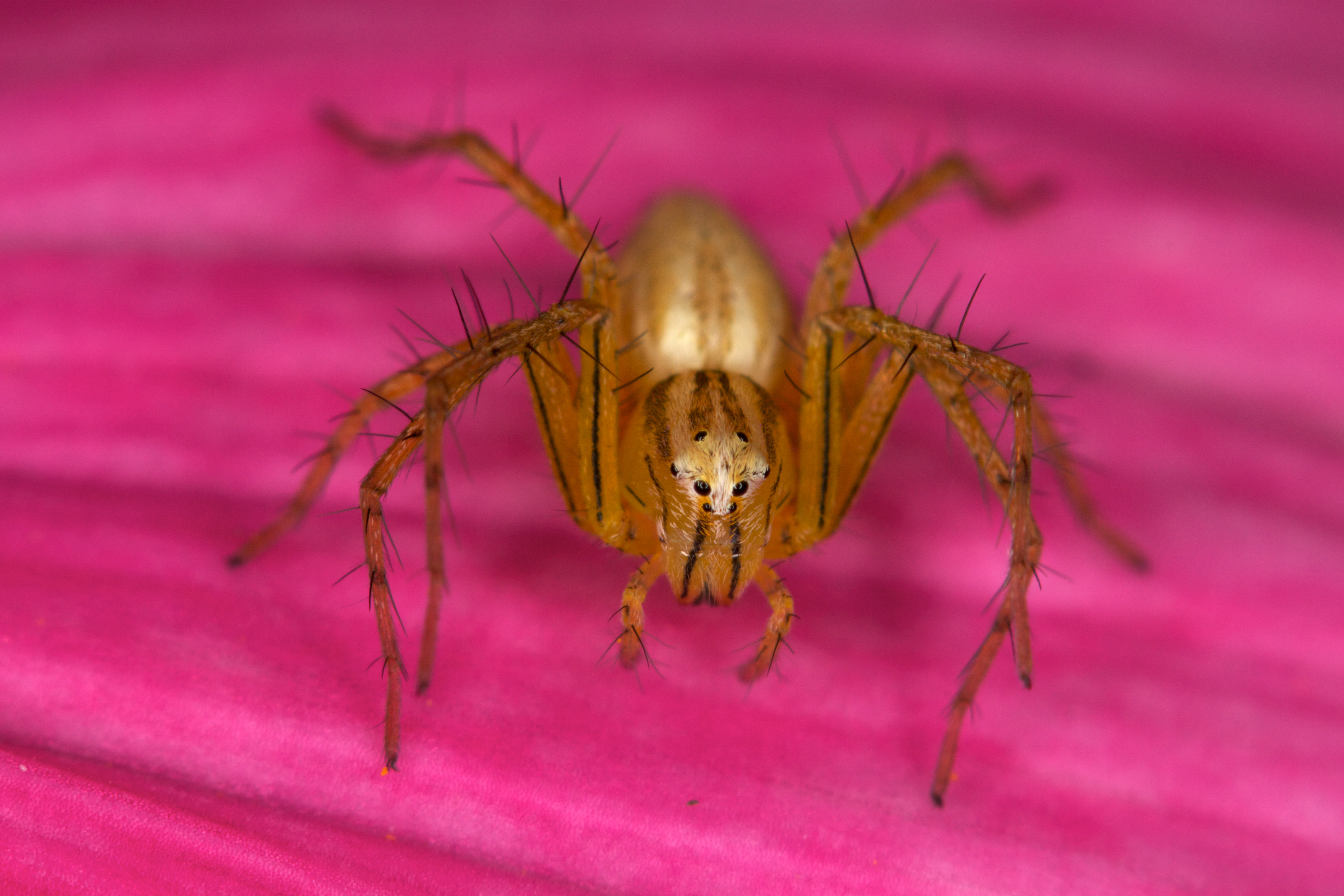 Elegant Lynx Spider